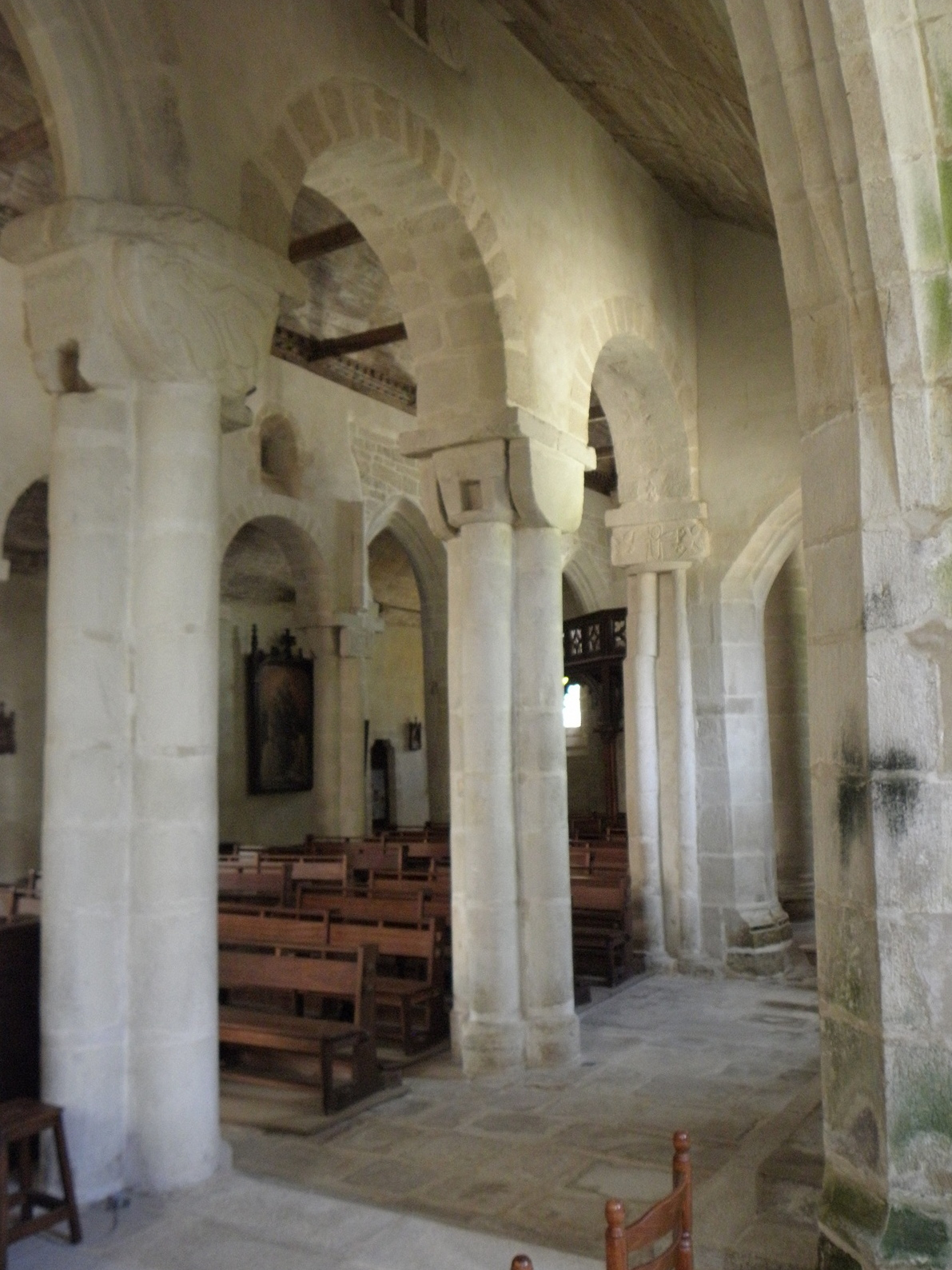 Nef de l'église Saint-Pierre-et-Saint-Paul de Langonnet (56) vue du collatéral sud. .